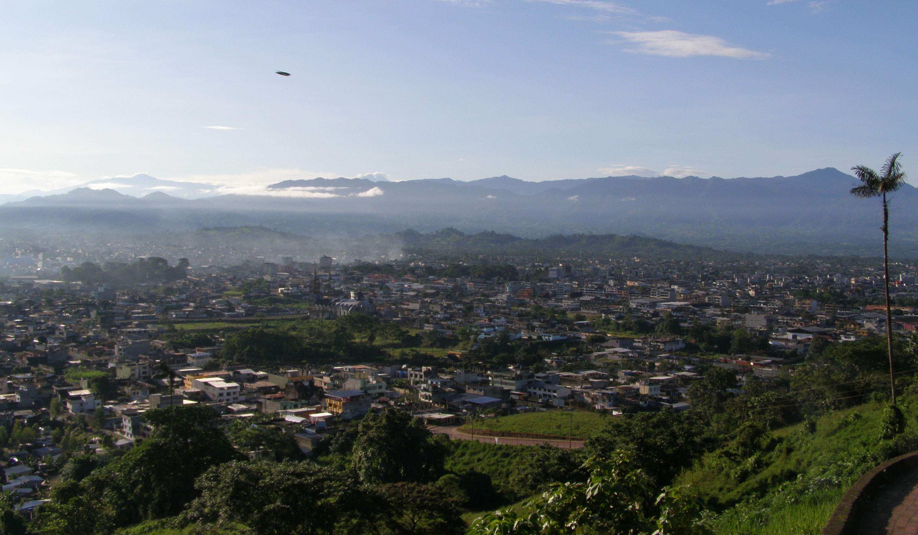 Santo Domingo, ubicada en la provincia de Santo Domingo de los Tsáchilas, Ecuador. A 130 km de Quito. La provincia se encuentra en la costa ecuatoriana